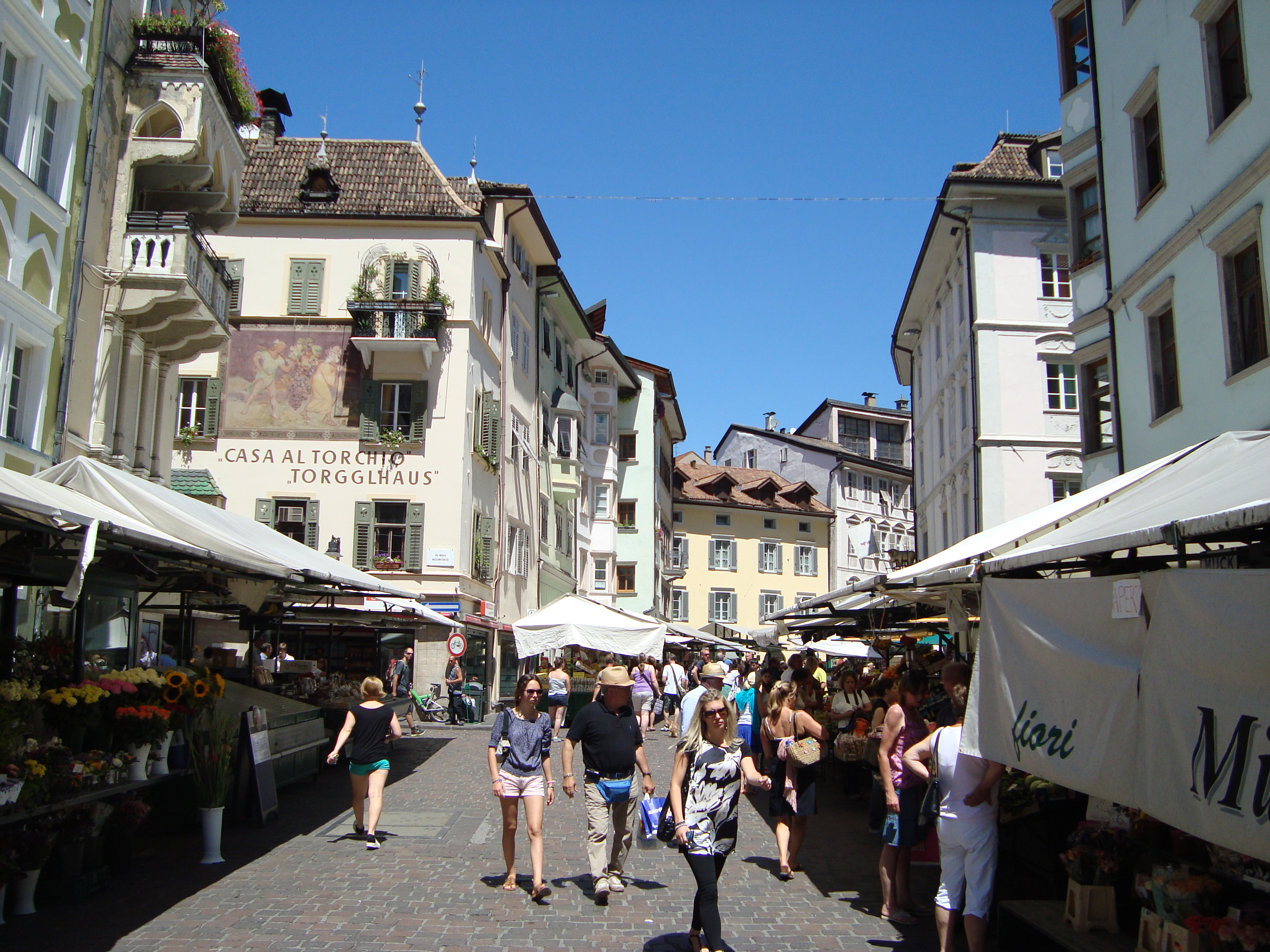 Bolzano